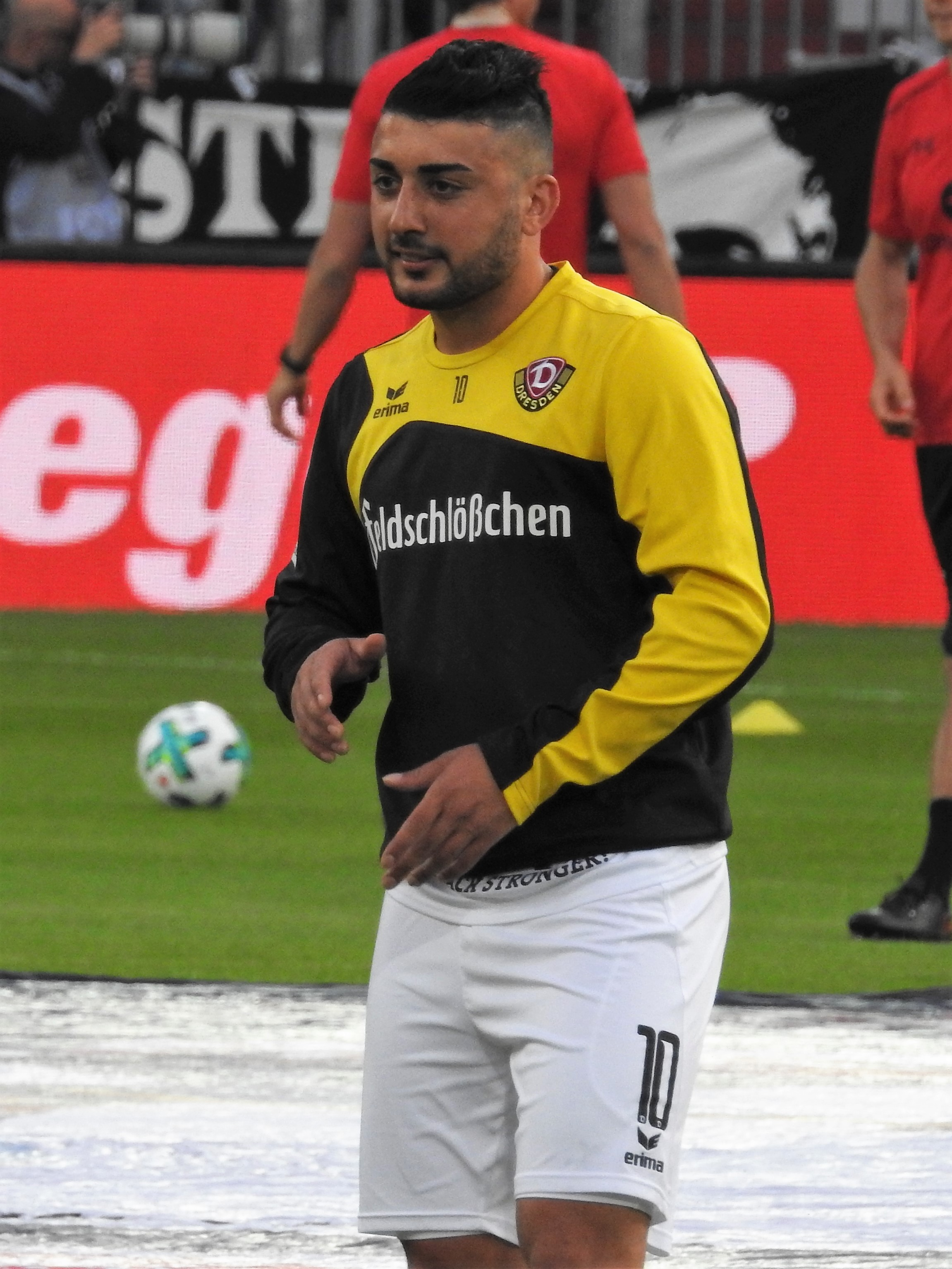 Aios Aosman, Dynamo Dresden